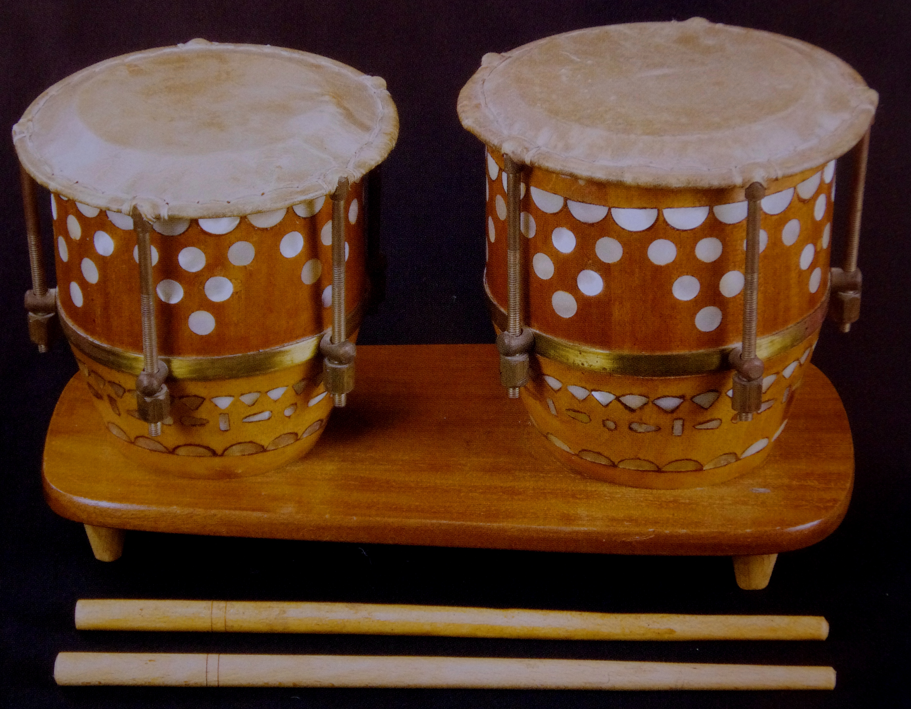 Azərbaycan xalq çalğı aləti qoşanağara